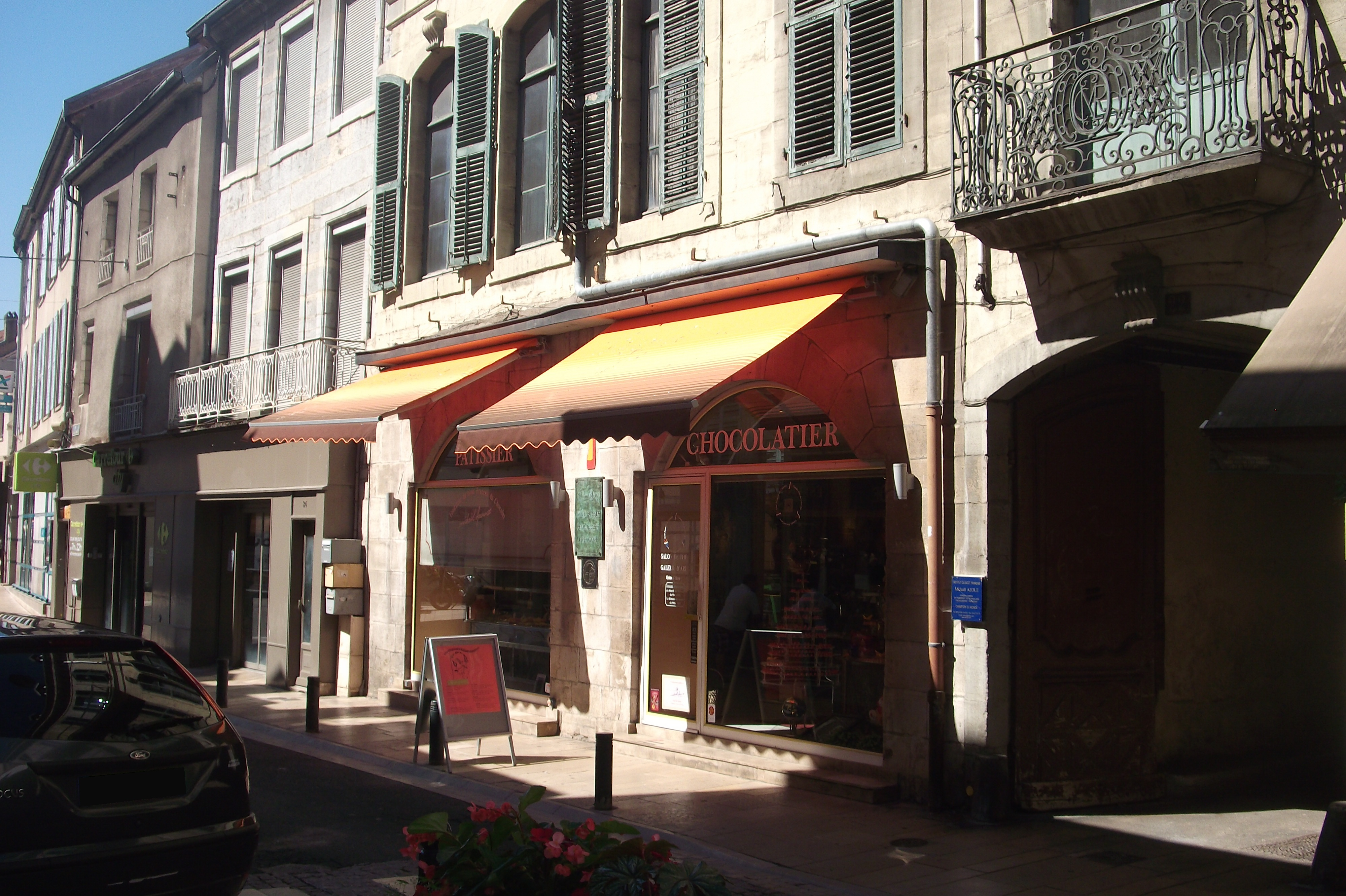 La pâtisserie de Mickaël Azouz à Vesoul (Haute-Saône, Franche-Comté)